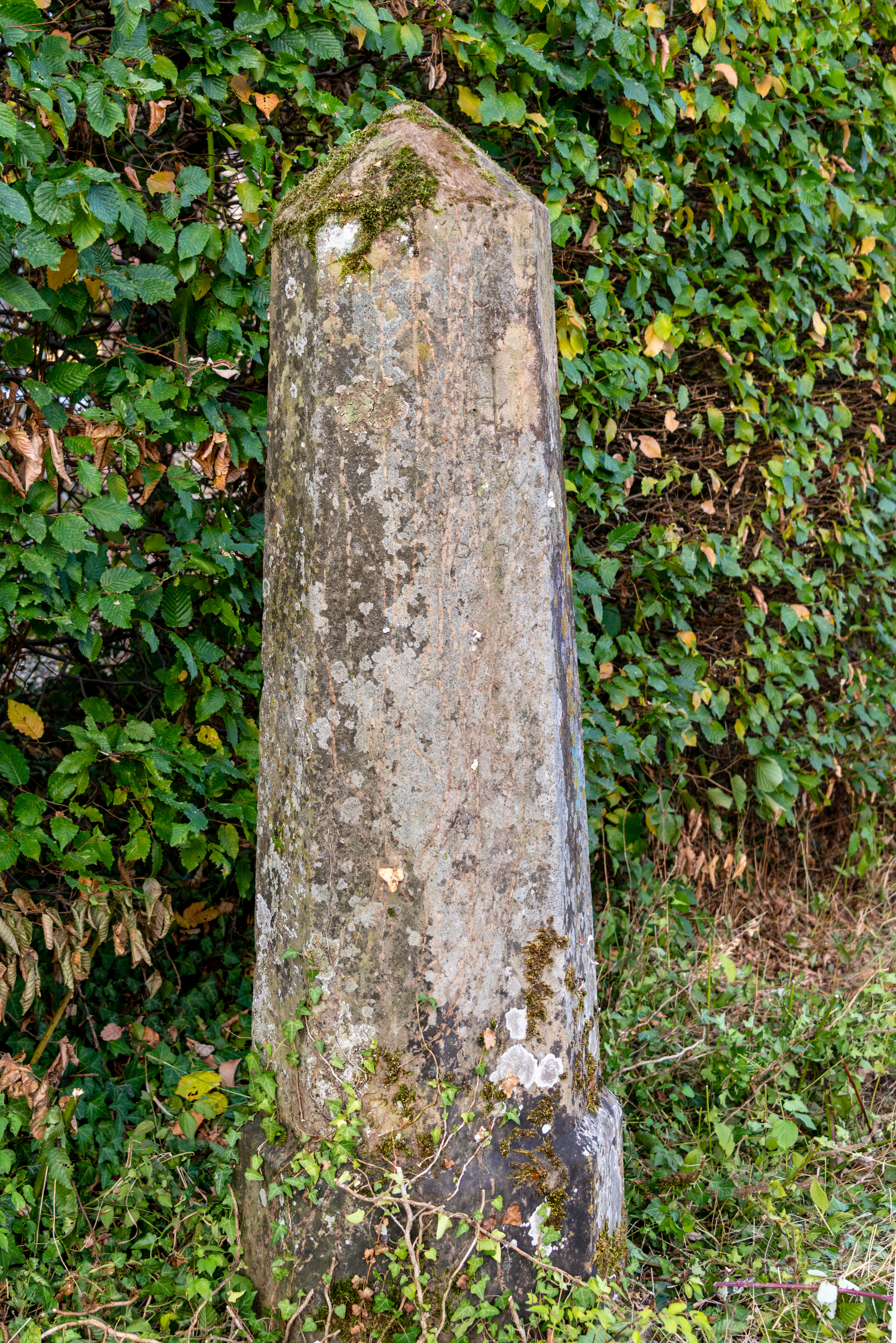 D'Grenzmaark zu Bech-Maacher bei der Rue de la Moselle (N10).